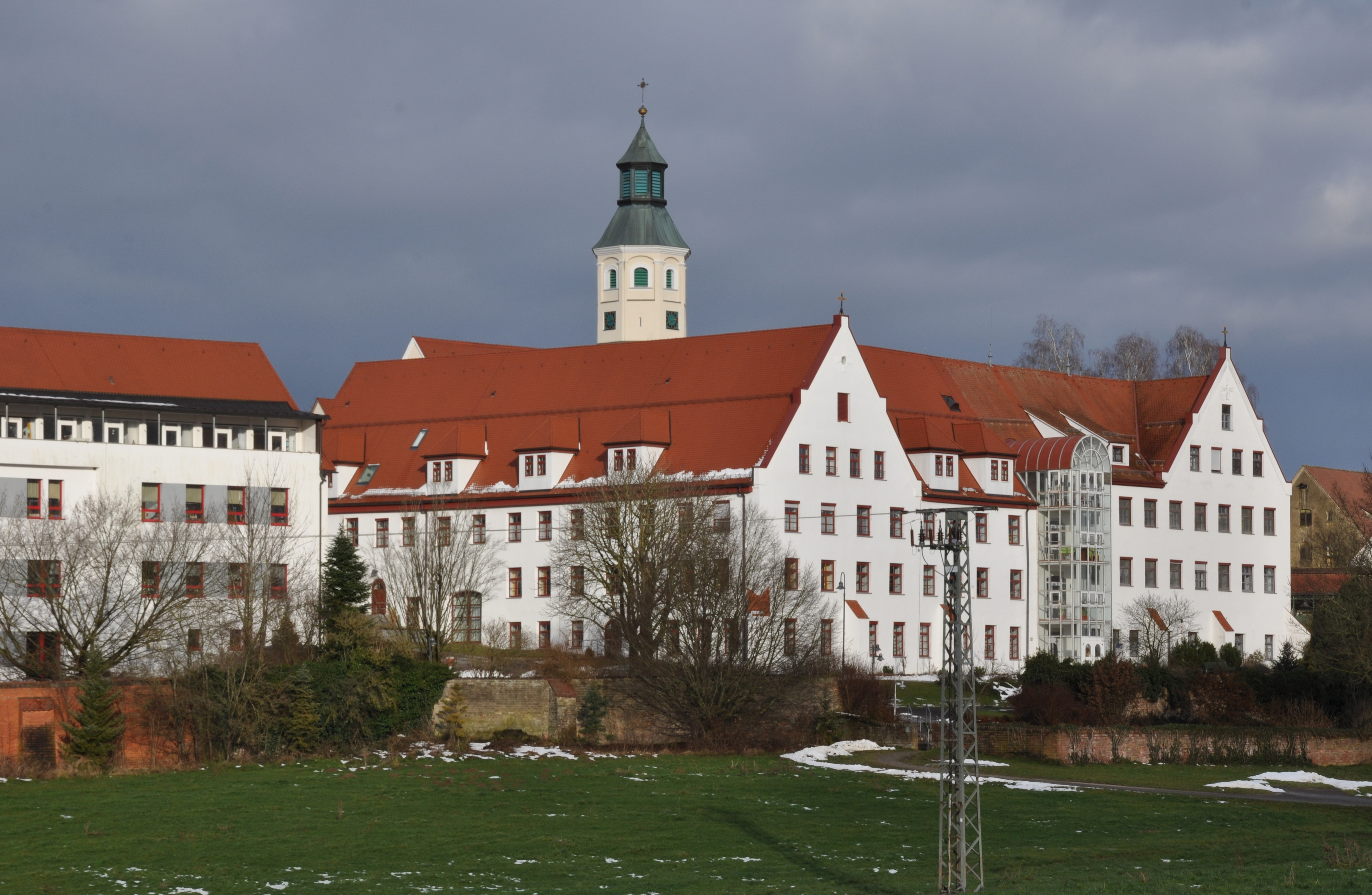 Ehemaliges Kloster Heggbach (Gemeinde Maselheim, Landkreis Biberach), heute Wohn- und Werkstattverbund ders Bereichs Behindertenhilfe der St. Elisabeth-Stiftung